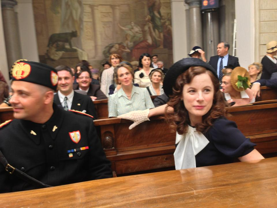 il pubblico al Tribunale di Varese durante le riprese del film "Il pretore", diretto da Giulio Base, nell'agosto 2013. In prima fila si riconosce l'attrice Sarah Maestri.